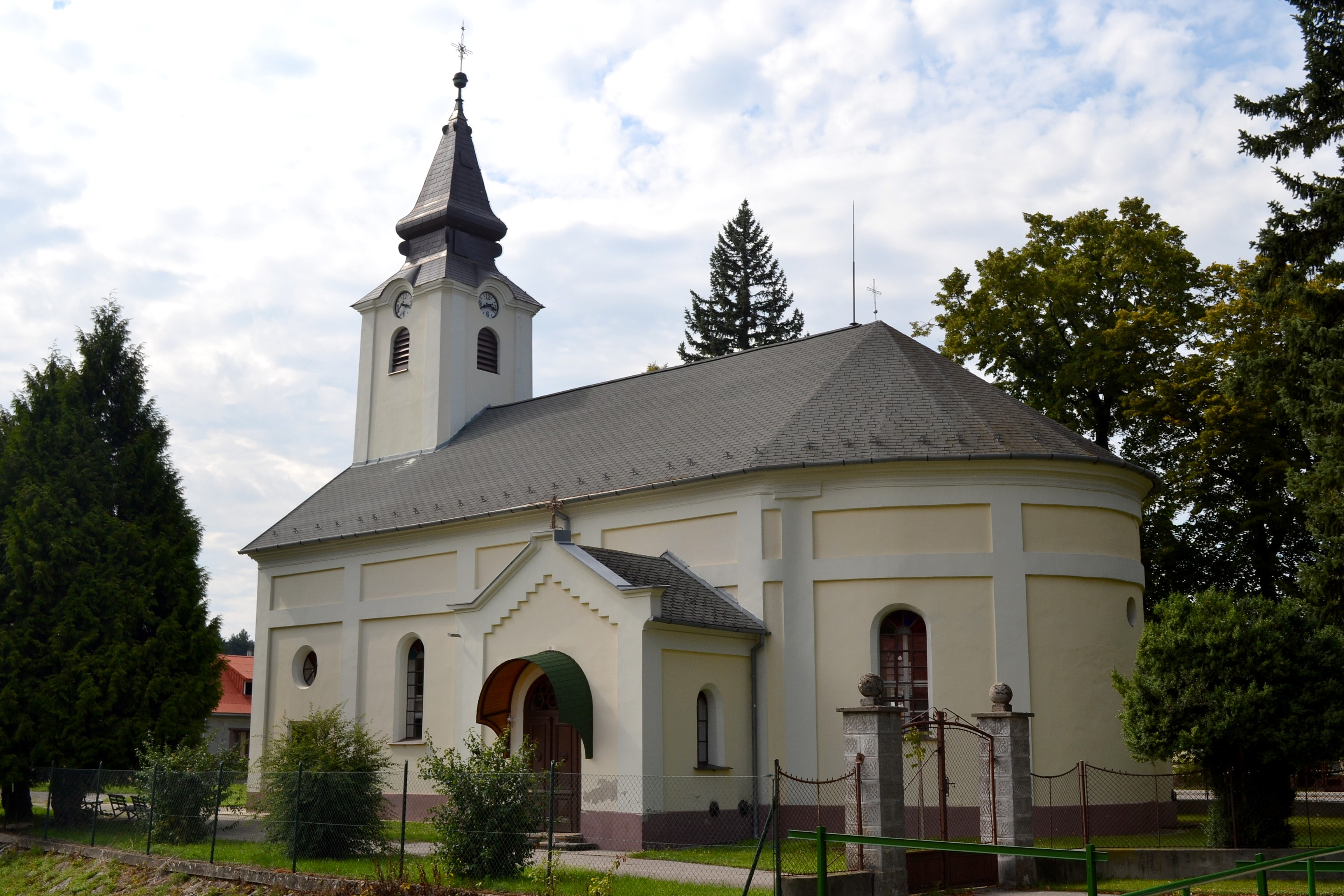 Evanjelický kostol v Bzinciach pod Javorinou z rokov 1793 - 1759